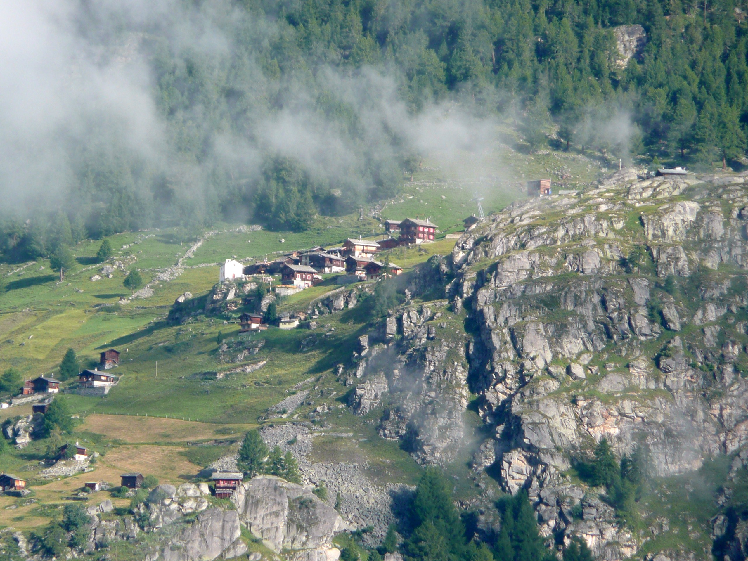 Blick von Grächen auf Jungen.